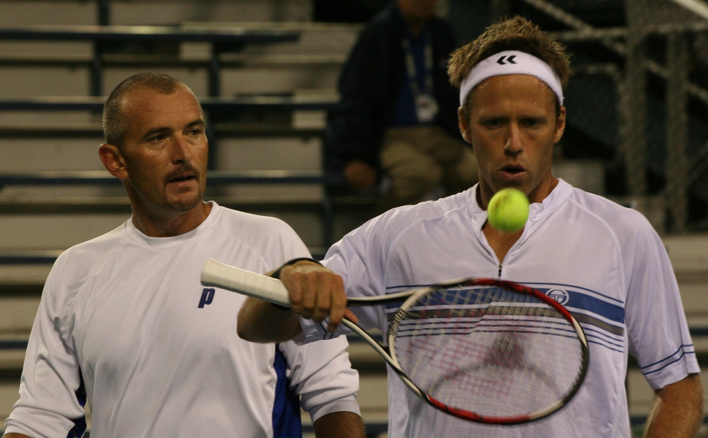 U.S. Open Wednesday, Sept. 2, 2009